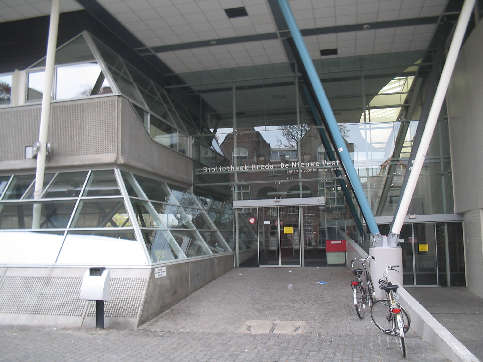 Ingang van de hoofdvestiging van de Bibliotheek Breda gevestigd in de Molenstraat 5 in Breda Centrum, dec. 2005